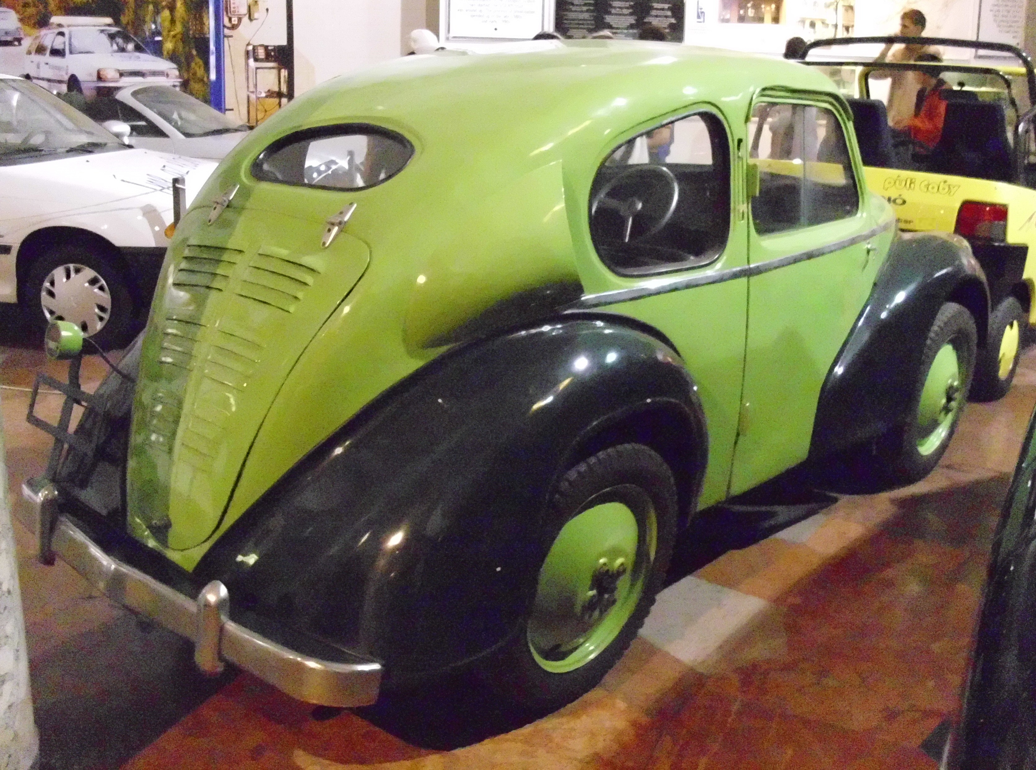 Pente 600 1948 im Transportmuseum Budapest